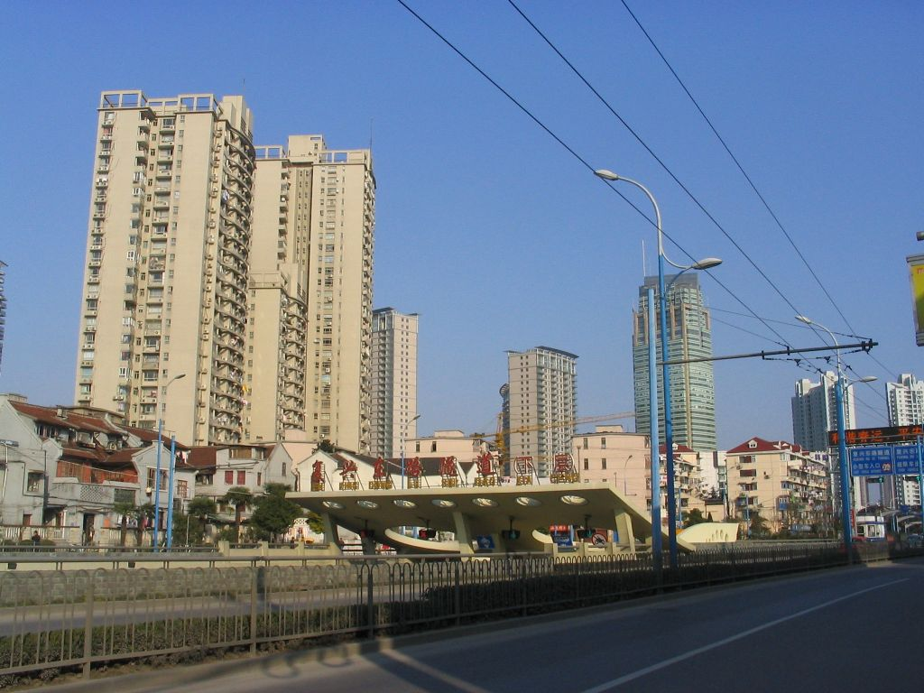 復興東路隧道-下層車道-浦西入口 Fu Xing Road (E) Tunnel, Puxi Entrance